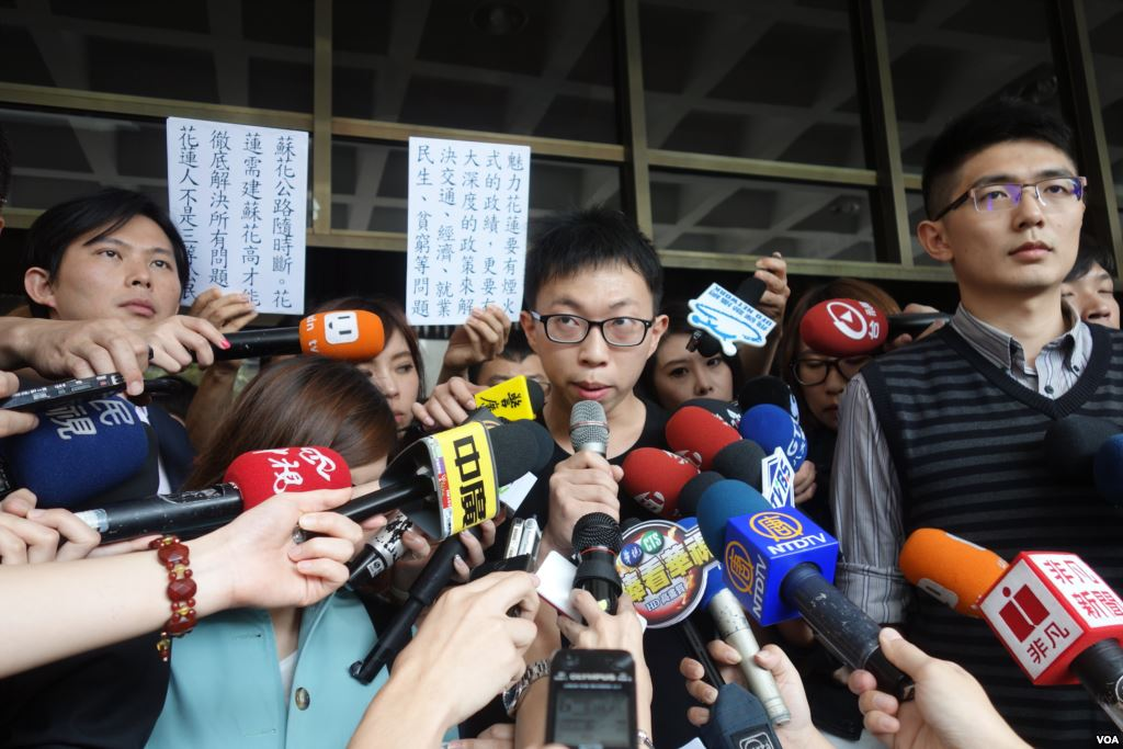 太陽花學運學生領袖魏揚在台北地方法院門口宣讀“為民主不服從”聲明